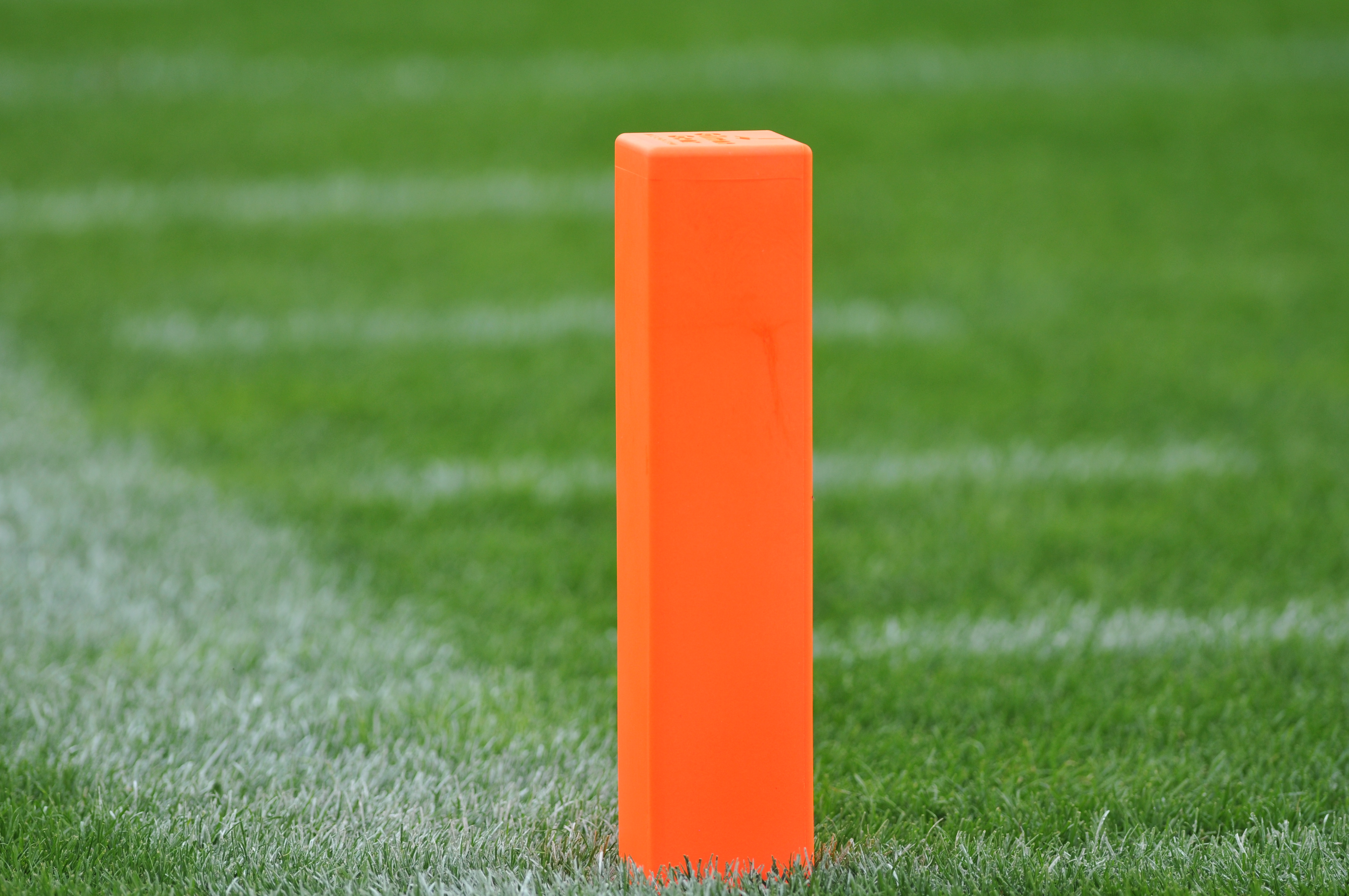 EM-Spiel Gruppe A, Spiel Schweden-Deutschland in St. Pölten.